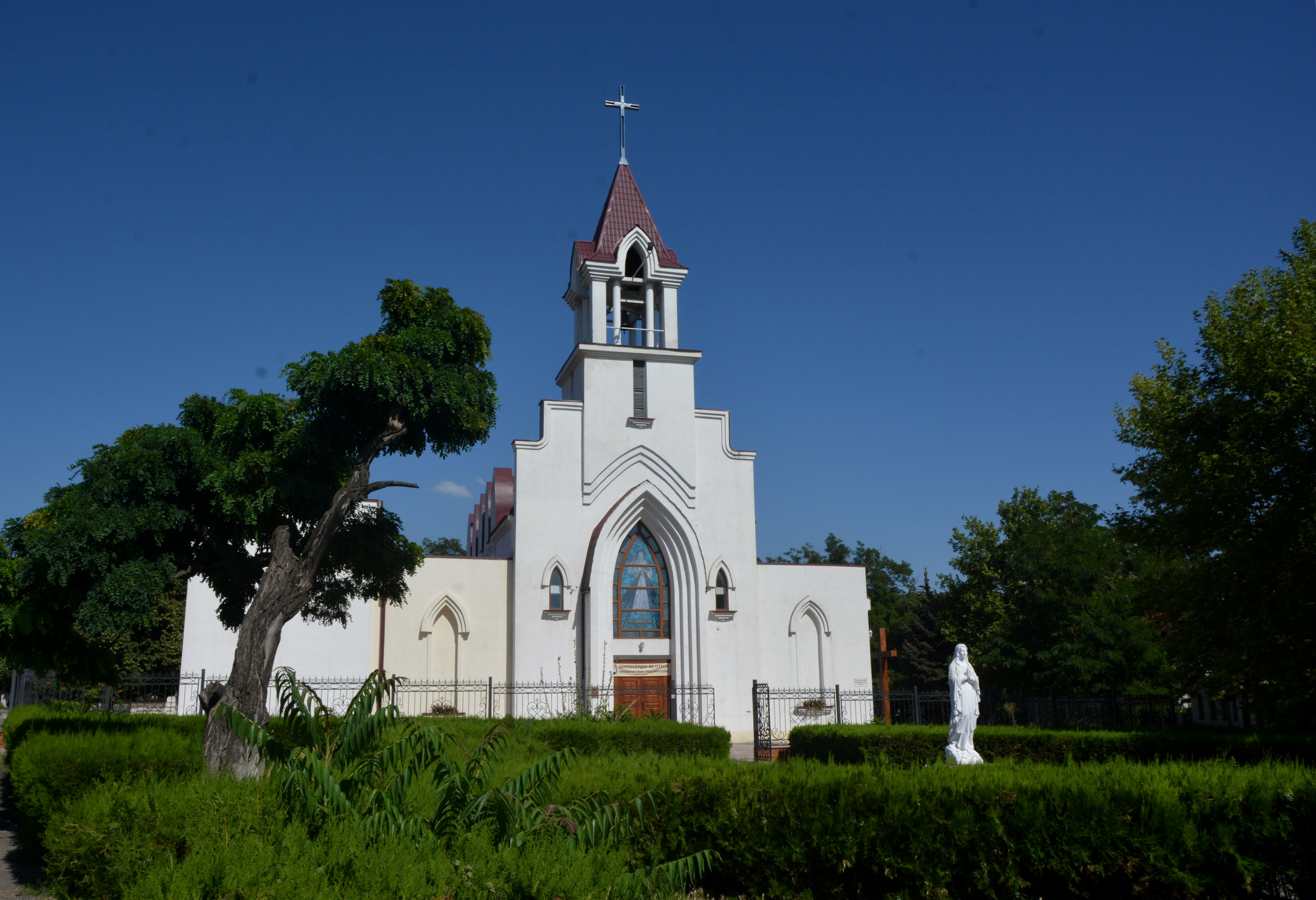 Лікарня (мур.), Херсон, вул. Суворова, 40